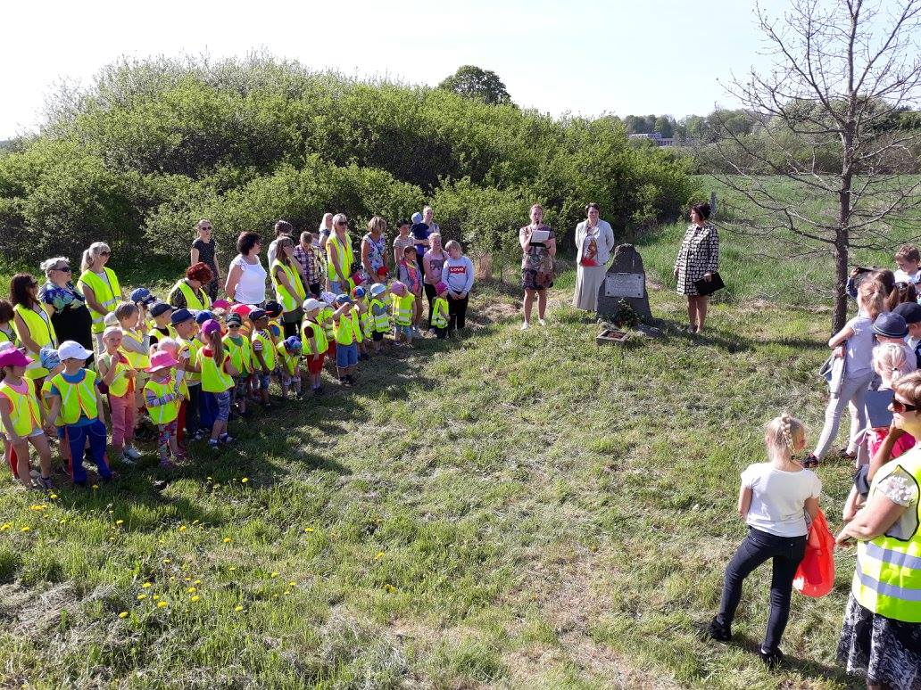 Lehola koolimaja 1872 aastal avatud kooli asukohta tähistava mälestuskivi juures.